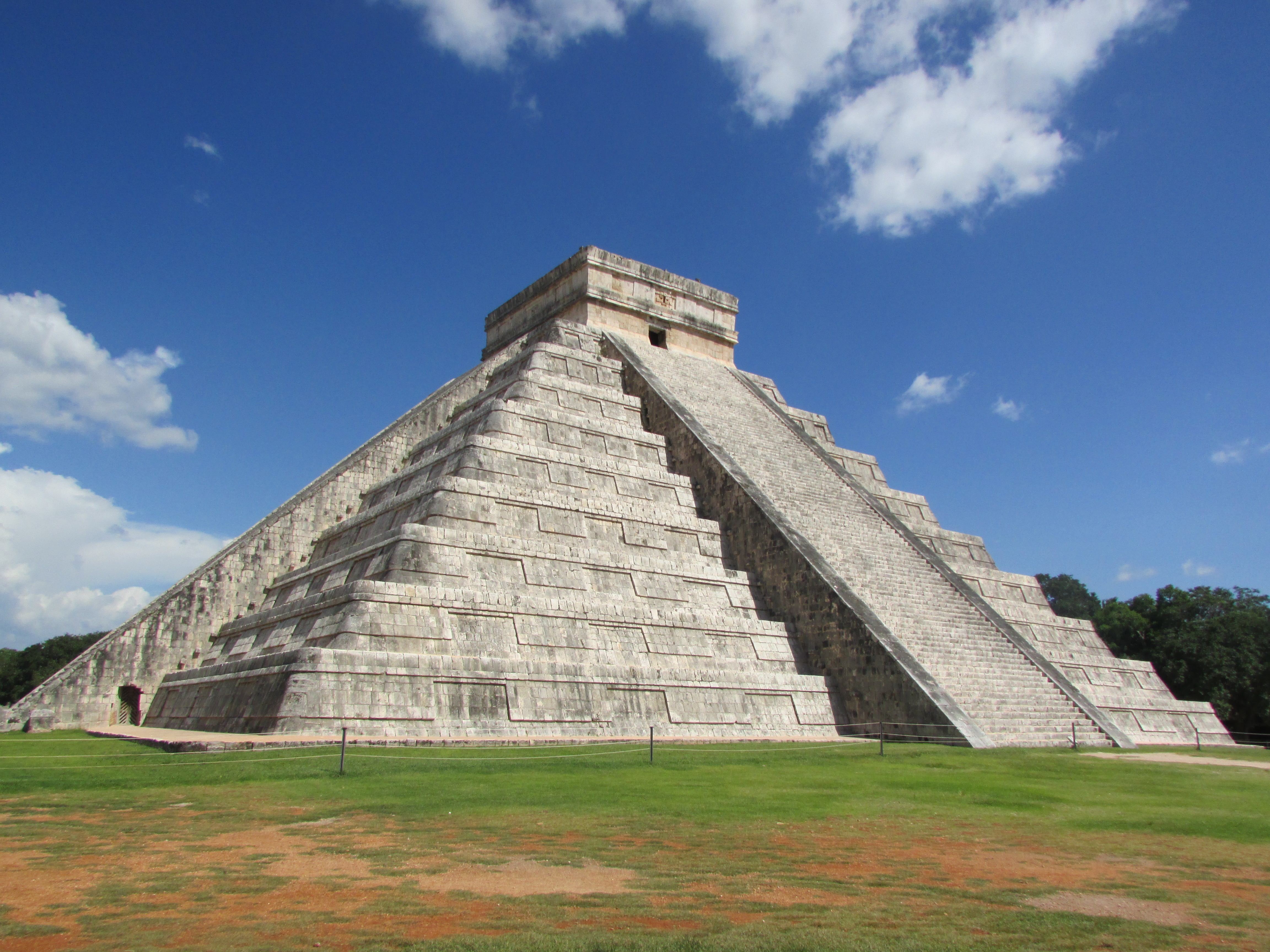 Piramide Chichen-Itza